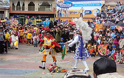 En la foto la representacion del "Relato de la diablada" con el Arcangel Miguel y la "Ira" despues de romper y pisar su máscara (Gran tradicional Autentica Diablada Oruro). Esta representacion teatral fue escrita y presentada al publico en Oruro, por el párroco Ladislao Montealegre en 1818, el relato presenta la lucha del Arcángel San Miguel y Lucifer, la diablesa China Supay y diablos acompañándolos. Esta representacion teatral aun es mantenida por la "Gran tradicional autentica diablada Oruro"